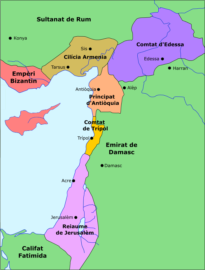 Mediterranèa Orientala après la fin de la Premiera Crosada.